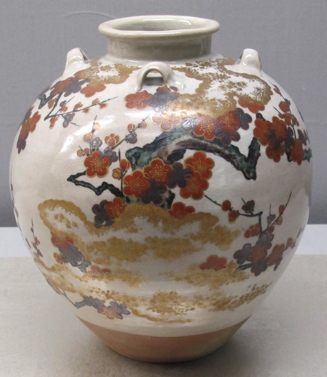 Periodo edo, giara per foglie di te, XVII sec